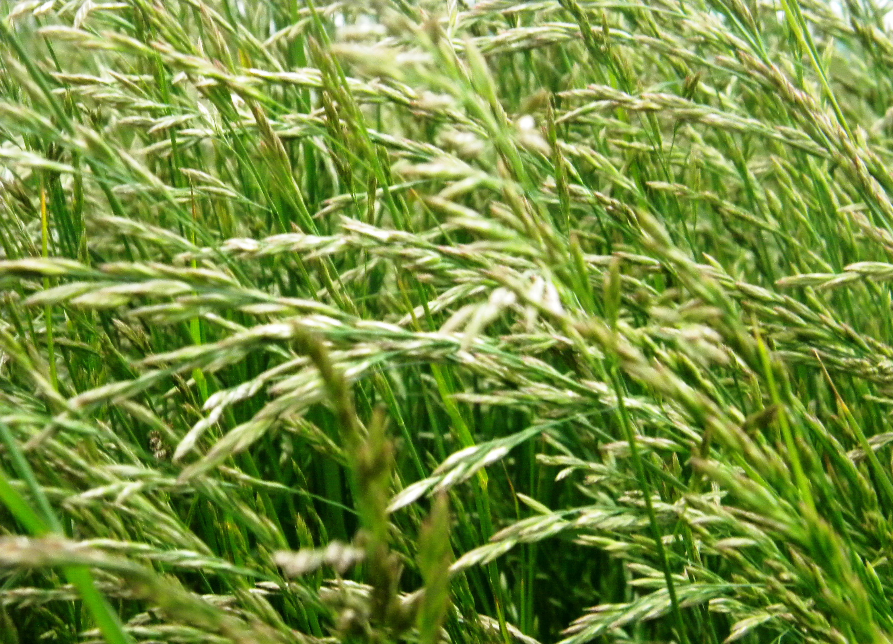 Festuca arundinacea